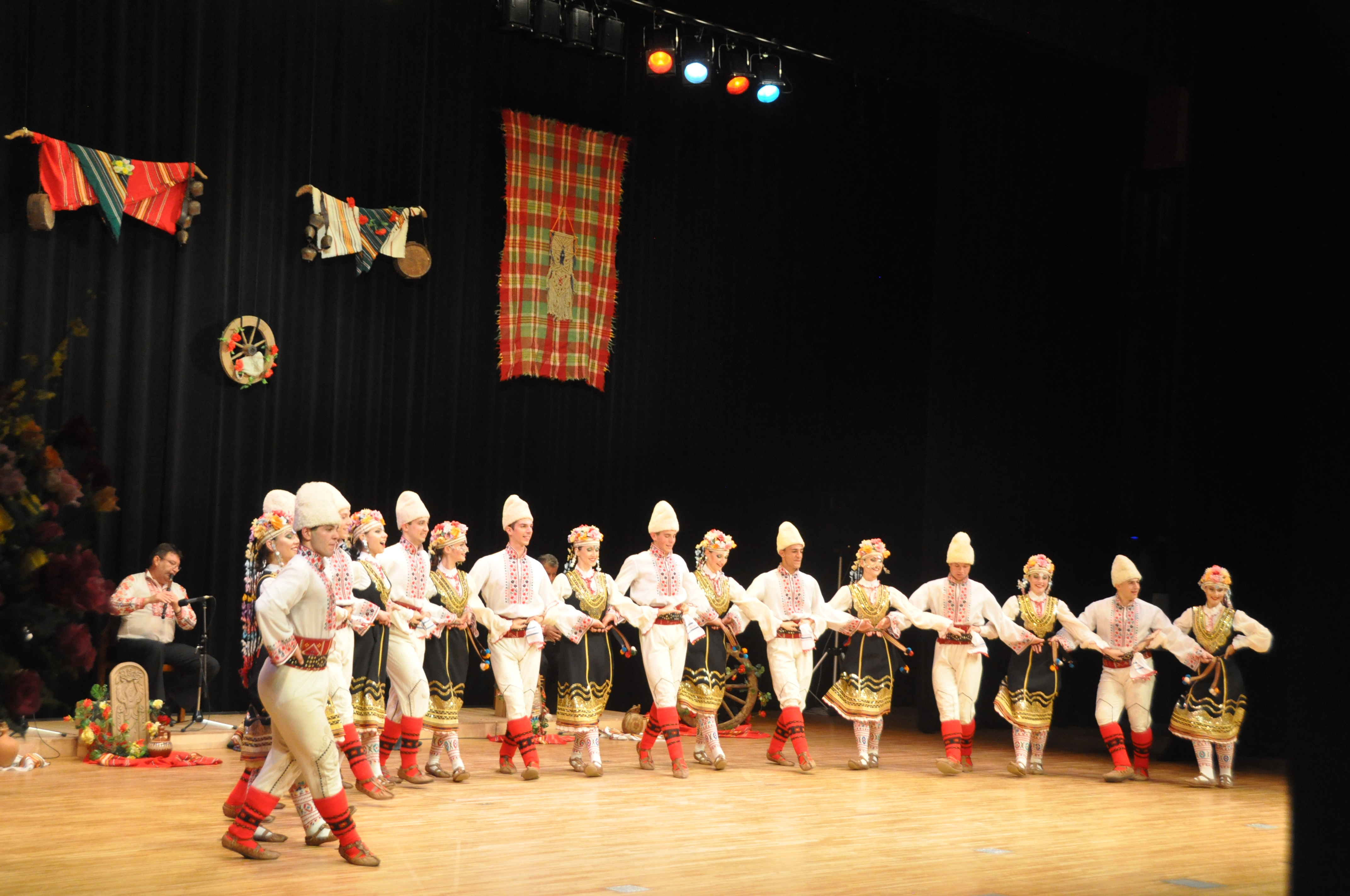 ブルガリア・カザンラック民族舞踊団の宗像ユリックス公演（2019年）の様子